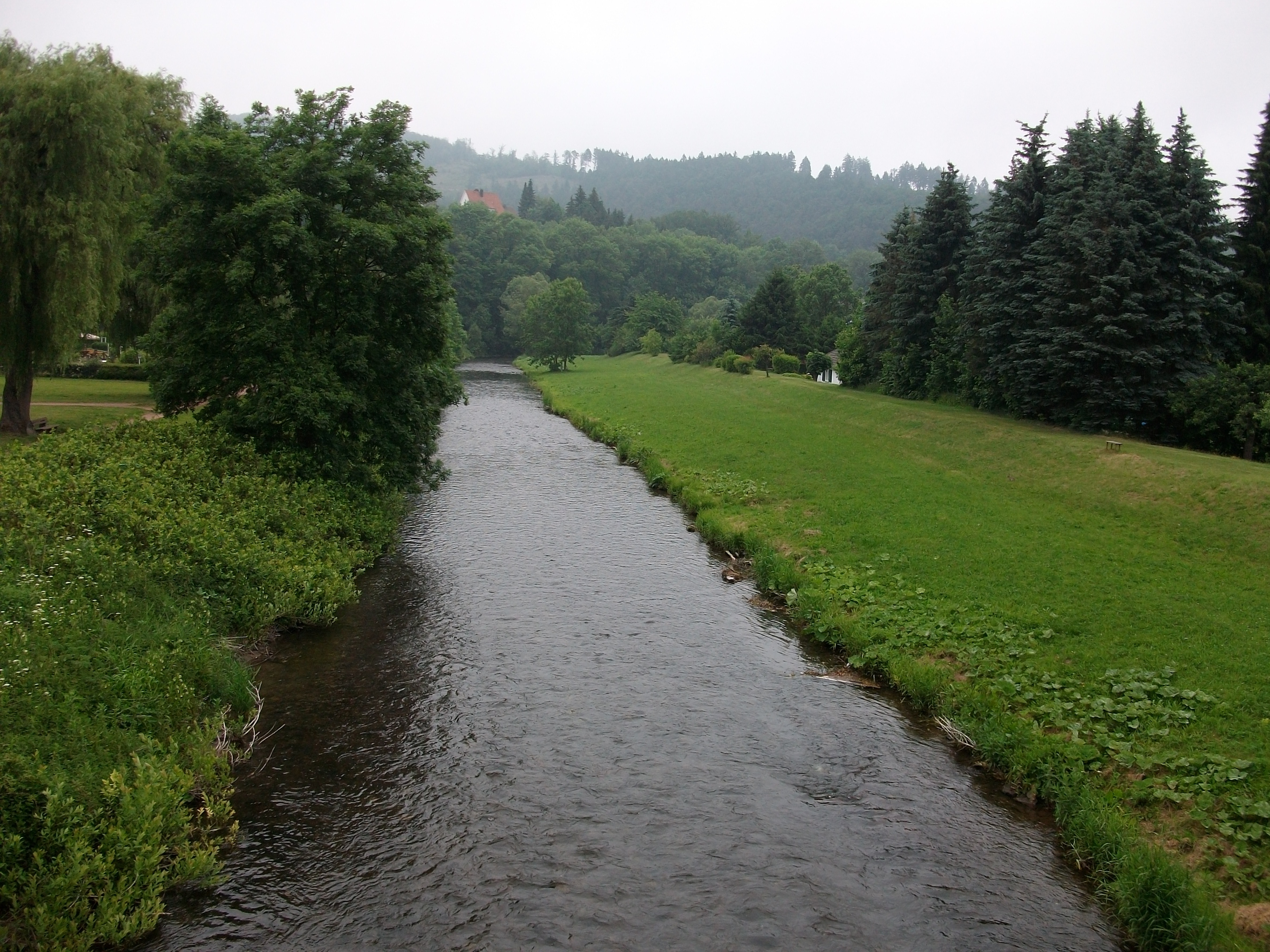 Diemel in Marsberg (Germany)